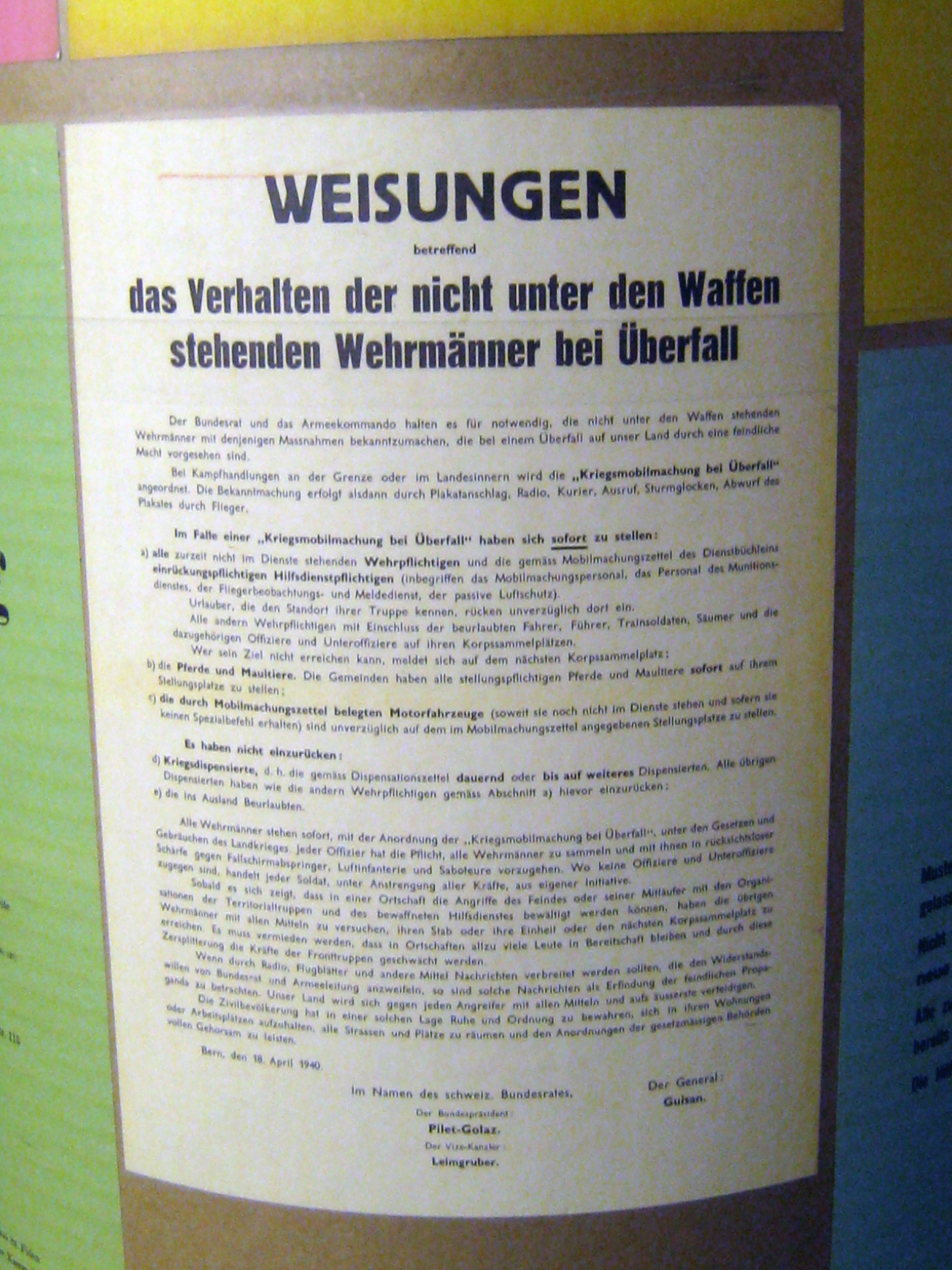 Weisungen der Schweizer Armee zur Kriegsmobilmachung bei Überfall, fotografiert in der Festung Heldsberg, St. Margrethen, Kanton St. Gallen